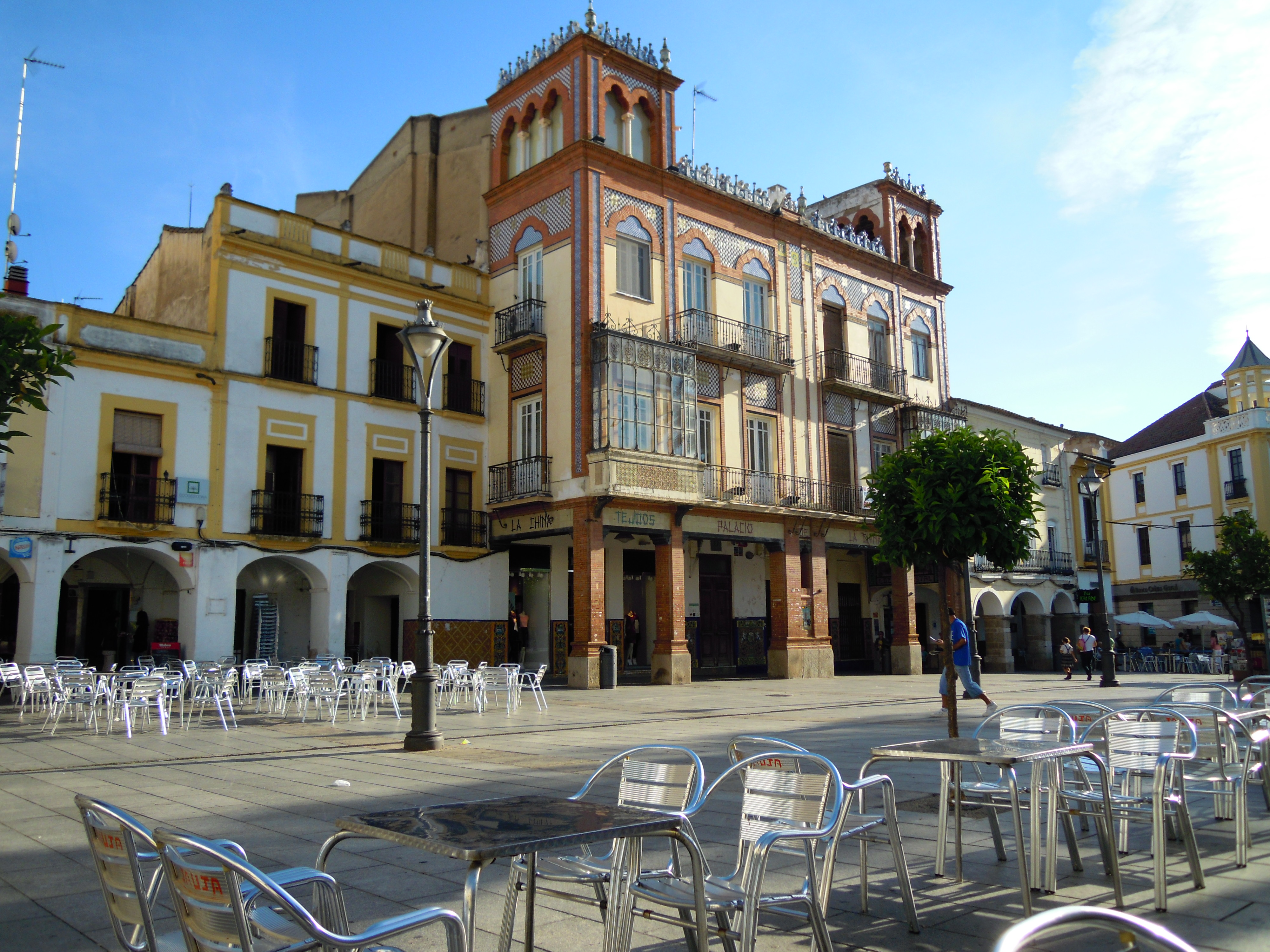 The Main square (Plaza de Espana), Mérida, Extremadura, Spain